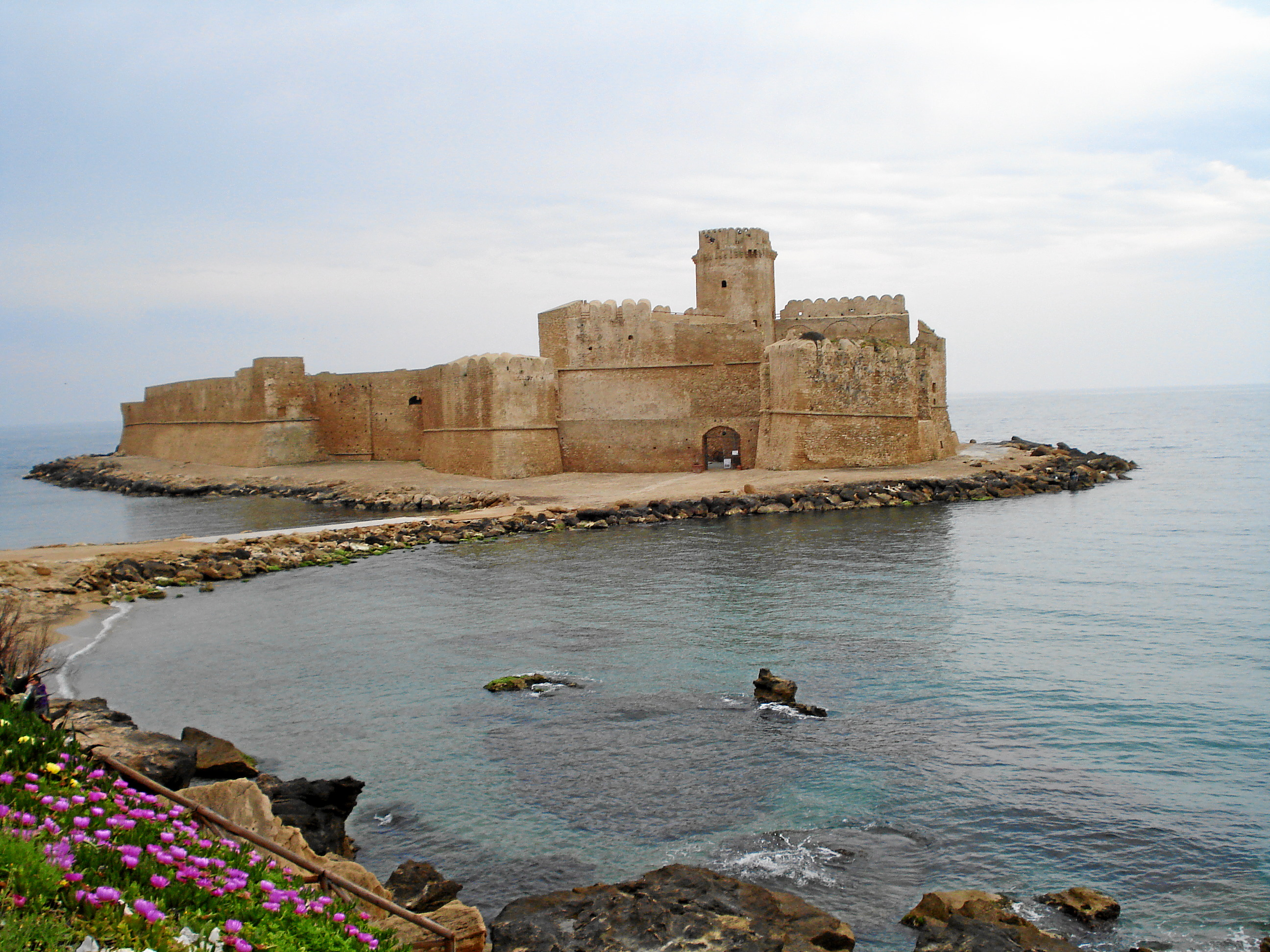 Castello di Le Castella